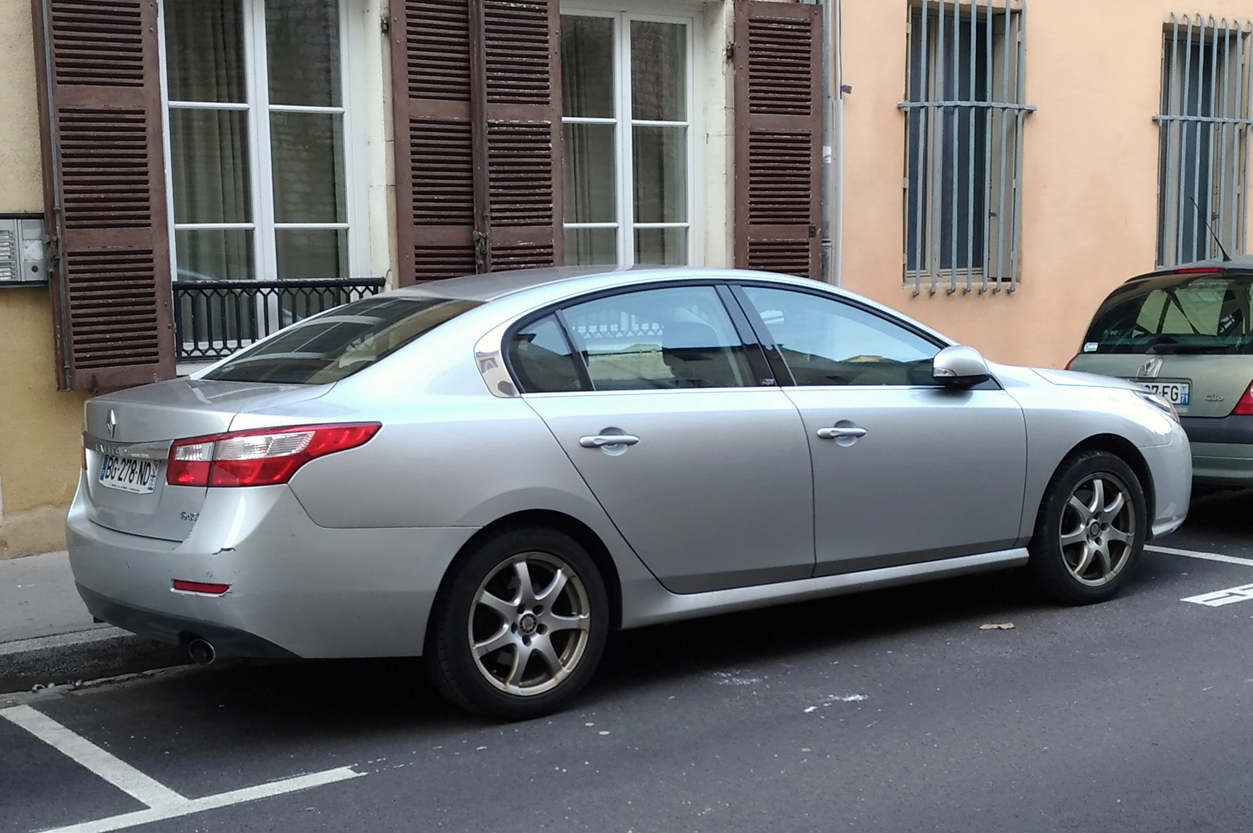 2011 Renault Latitude V6 (V6 3.0 dci 240 hp) at Chalon sur Saone